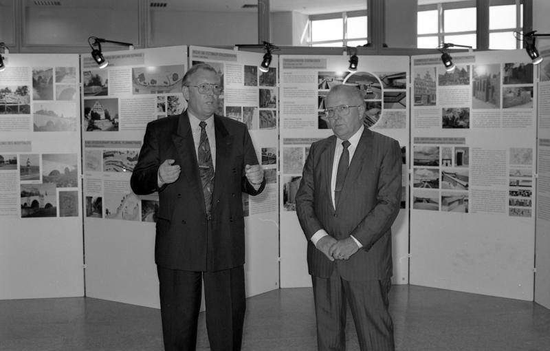 Bonn, 17.7.1991 Für die Bundesvereinigung der Straßenbau- und Verkehrsingenieure e.V. (BSVI) eröffnete deren Präsident, Diplomingenieur, Manfred Werz, in Anwesenheit des Staatssekretärs im Bundesverkehrsministerium, Dr. Wilhelm Knittel, im Bundesverkehrsministerium die Ausstellungen "Wege zu Mehr Verkehrssicherheit" und "Ingenieurbauwerke im Straßenbau".